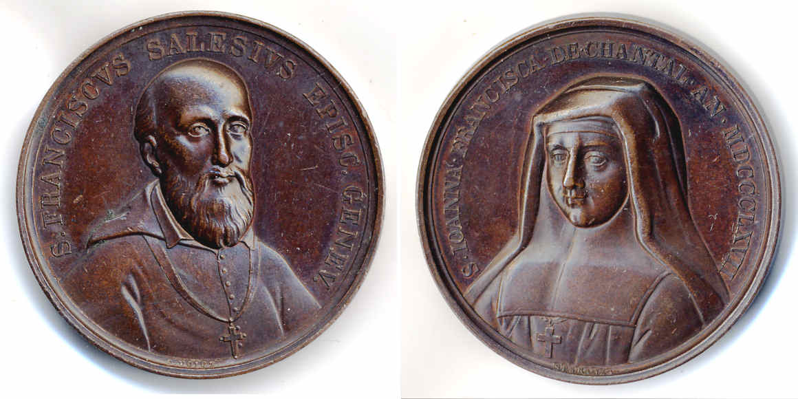 St François de Sales et Ste Jeanne de Chantal, médaille, 34mm